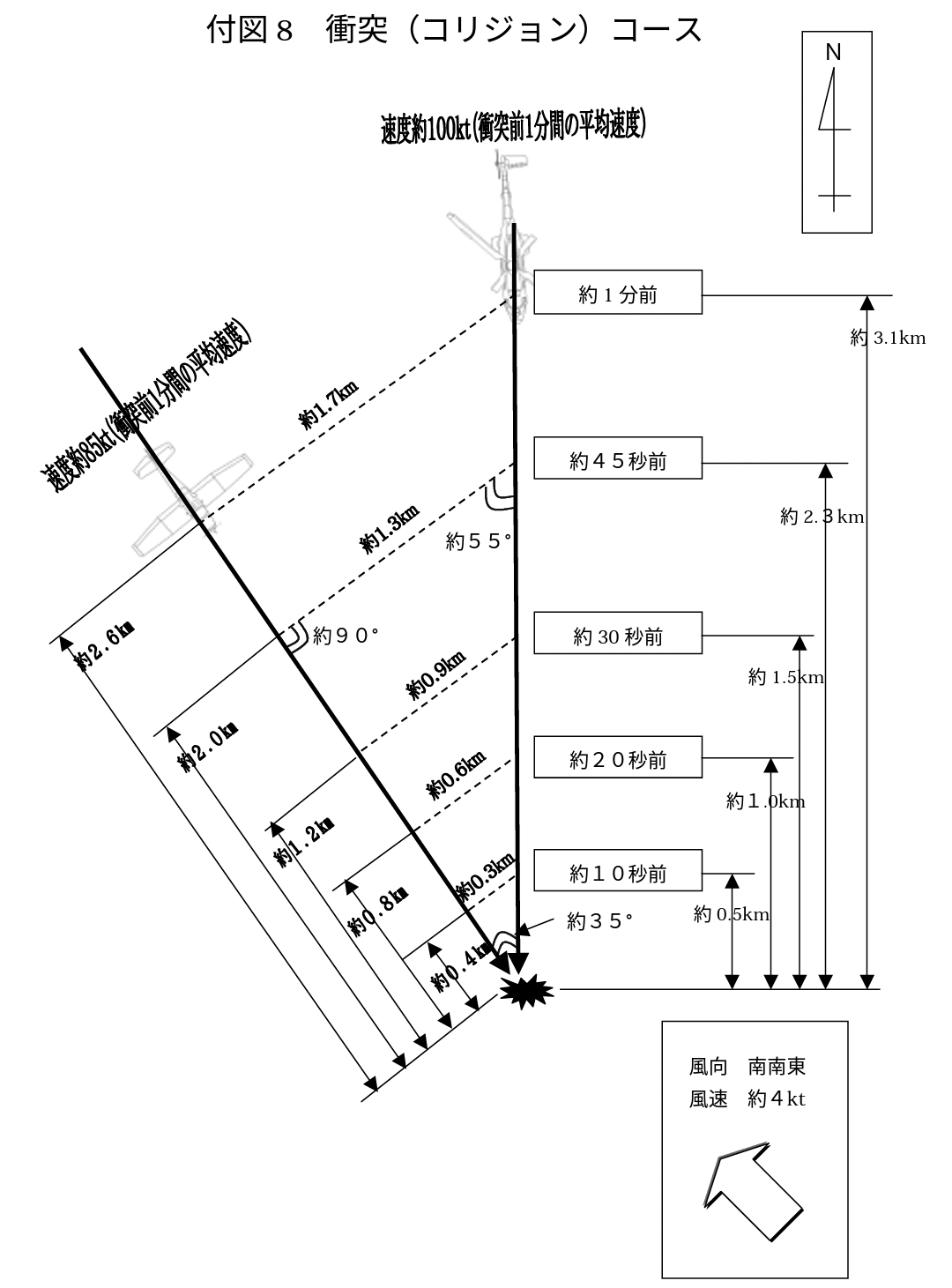 運輸安全委員会の報告書2002-8より